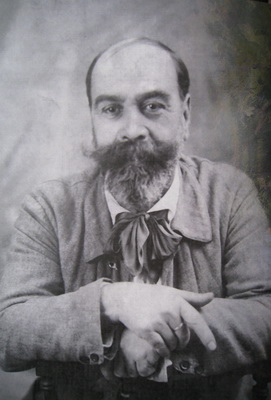 retrat de Joaquim Mir